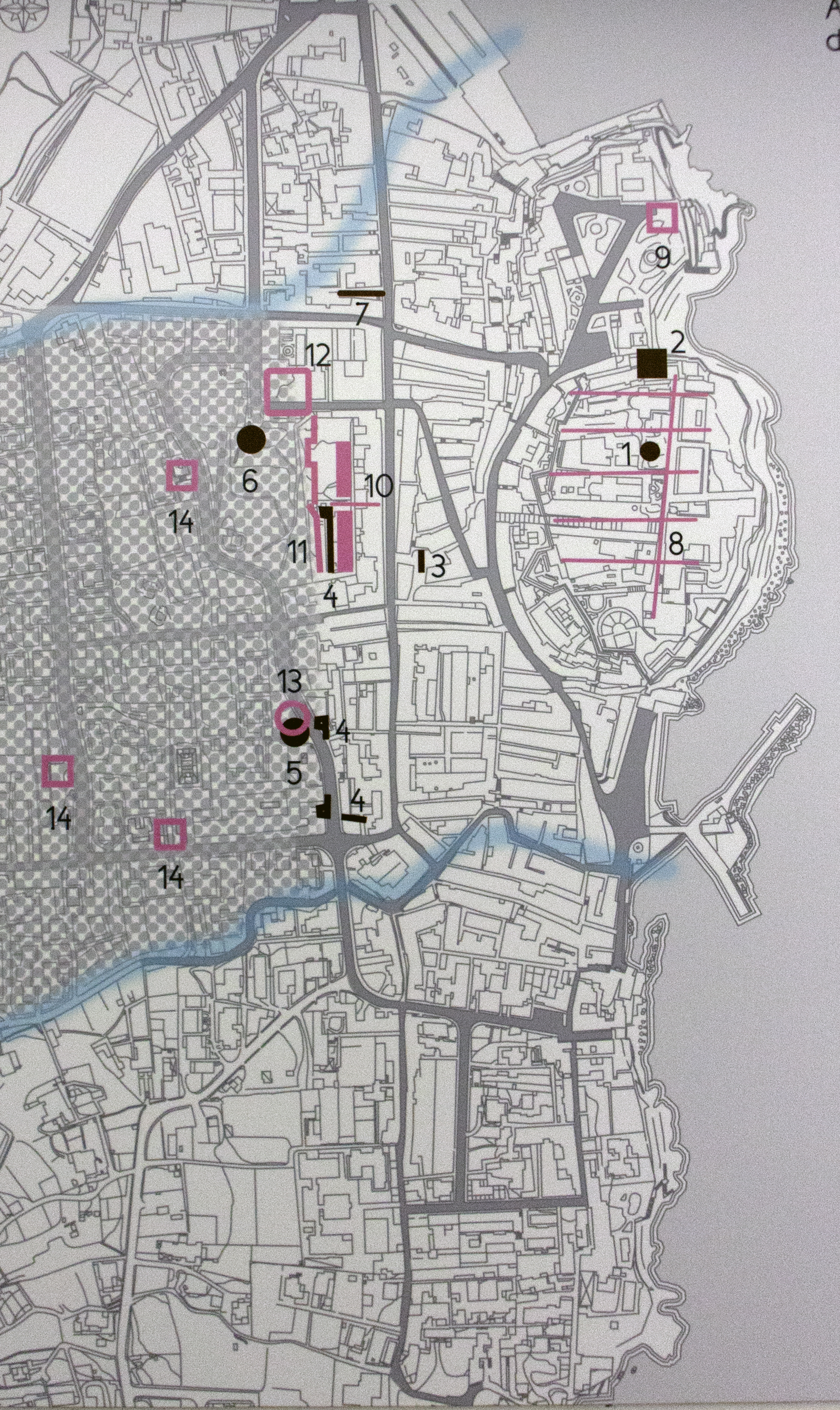 1. Bothros di Eolo - VI sec a.C. 2. torre greca - IV sec a.C. 3. Prima cinta muraria greca - VI sec a.C. 4. Seconda cinta muraria - IV sec a.C. 5. Santuario di Demetra e Kore - V-IV sec a.C. 6. Edificio di culto - VI sec a.C. 7. Case greche - IV-III sec a.C. 8. Strade romane - II-I sec a.C. 9. Edificio pubblico romano - II sec d.C. 10. Insulae romane - I-IV sec d.C. 11. Fortificazione romana (aggere) - I sec a.C. 12. Terme romane - I-II sec d.C. 13. Arena romana - I-II sec d.C. 14. Ipogei funerari - II-IV sec d.C.